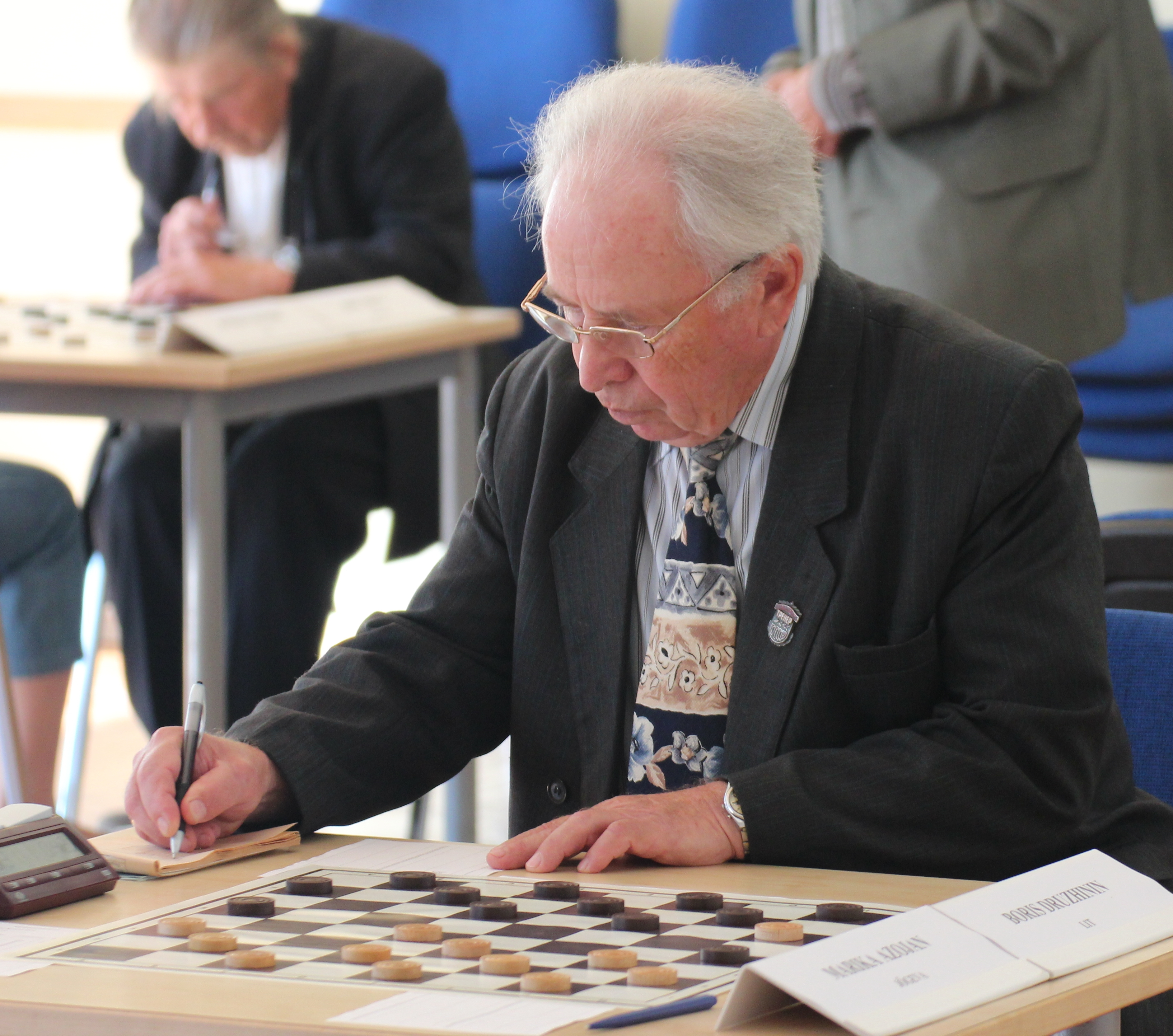 Boris Družinin mängimas Jõgeva kabeturniiril.